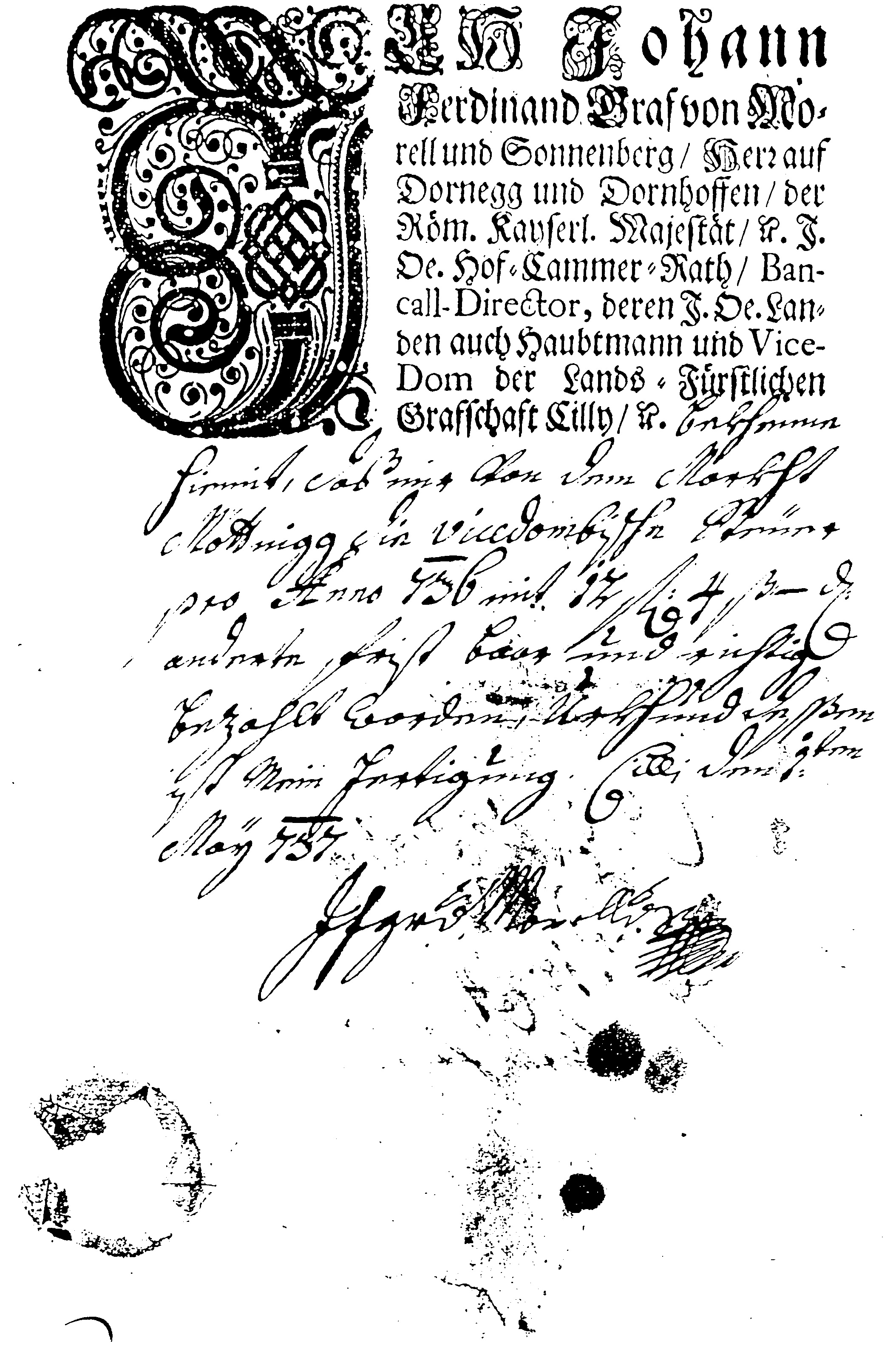 Davčni spis celjskega vicedoma Johanna Ferdinanda za trg Motnik. Datirano dne 1.5.1737.